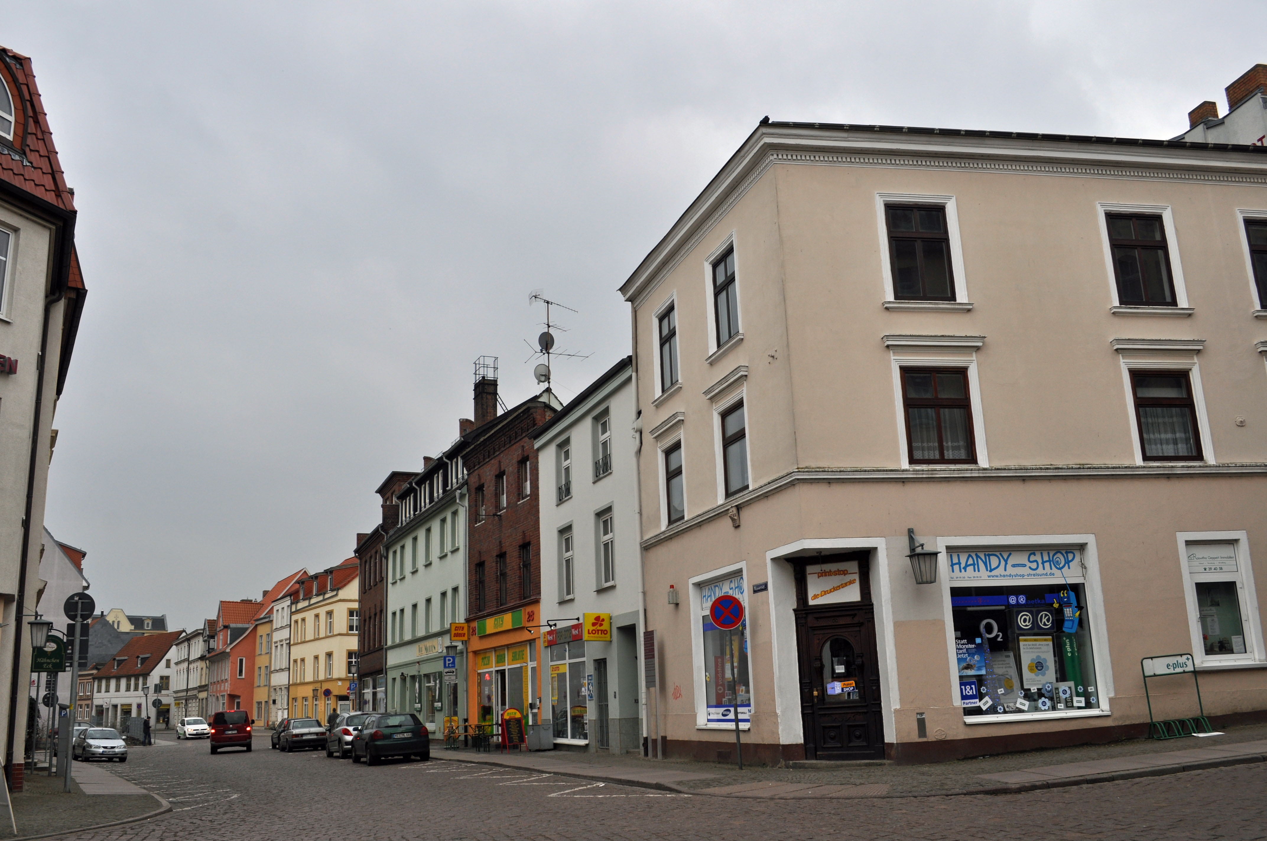 Gebäude bzw. Gebäudedetail in Stralsund. Straße und Hausnummer siehe Dateiname.